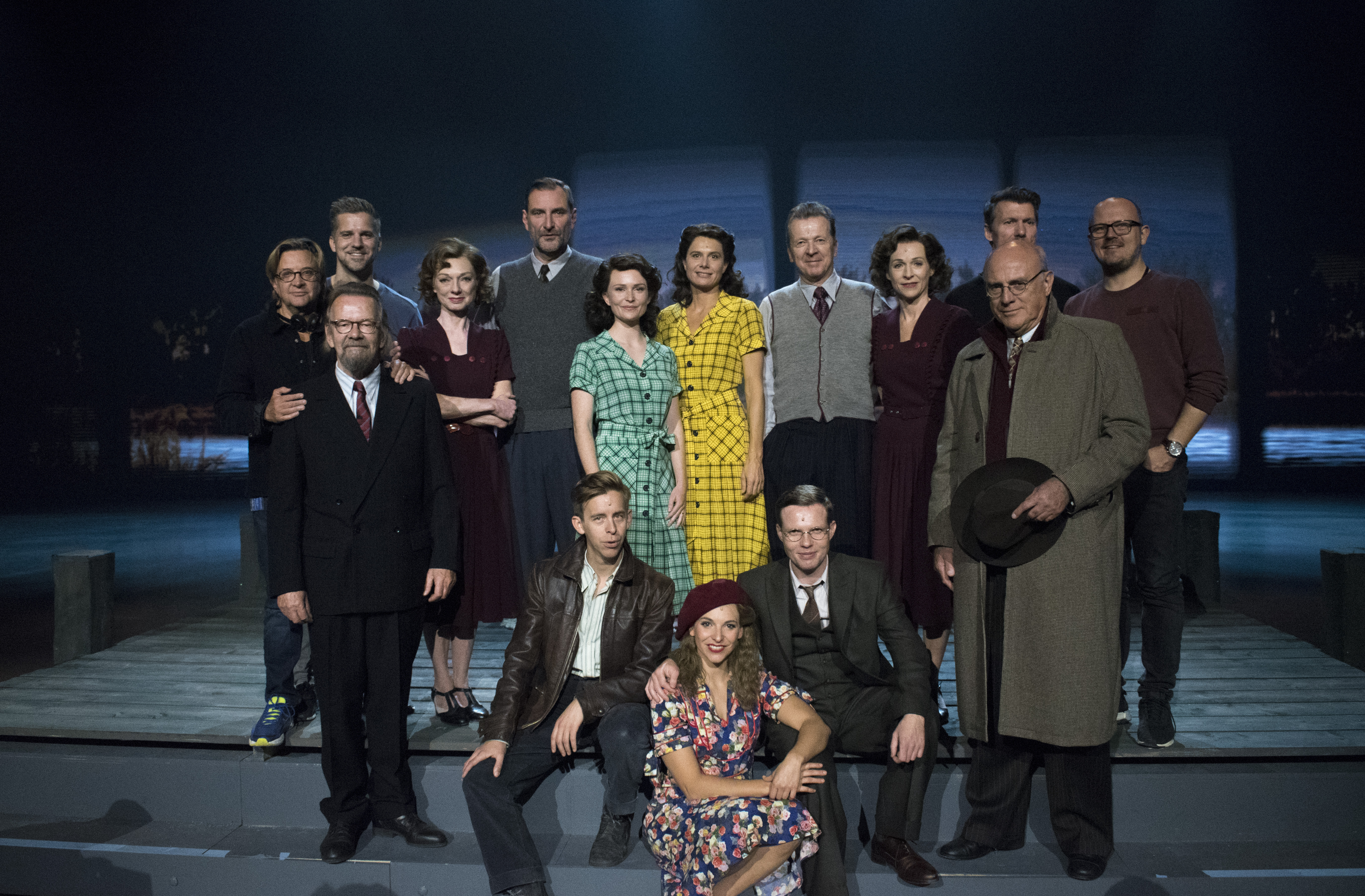 Foto van de Cast en Creatives van de Spektakel-Musical 40-45 tijdens een exclusieve preview voor de Vlaamse en Nederlandse pers.